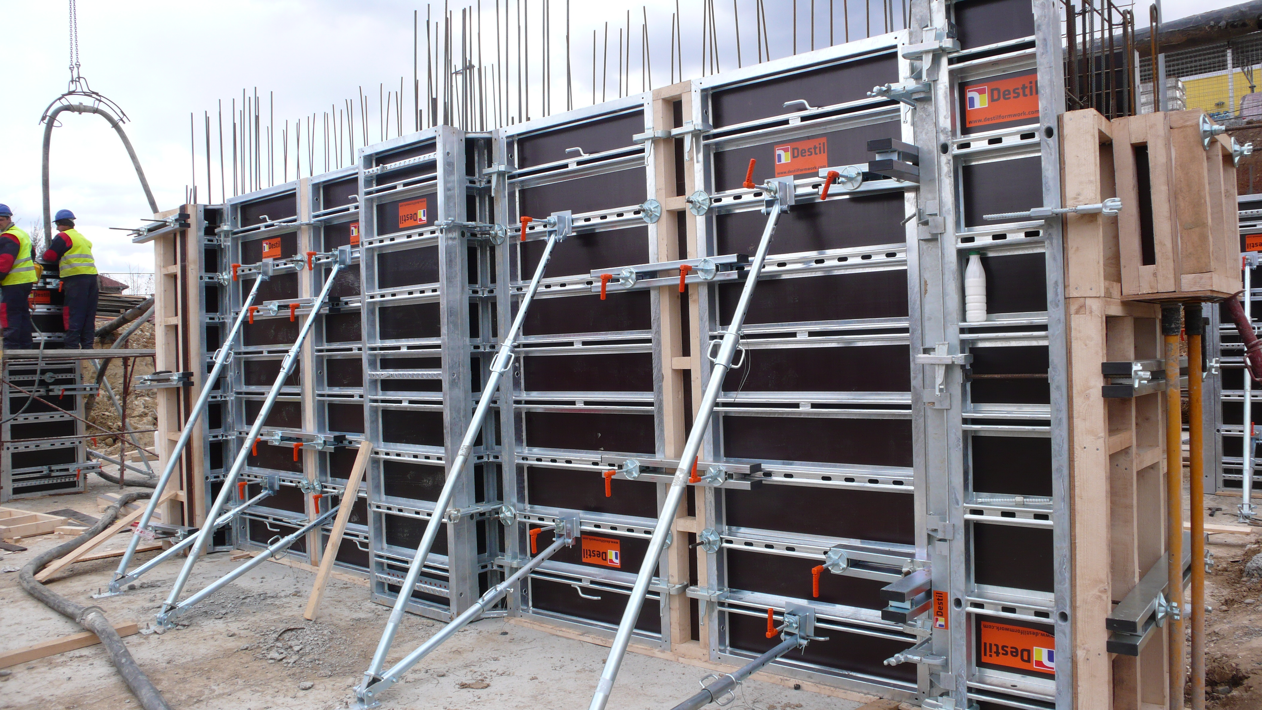 Formwork Destil